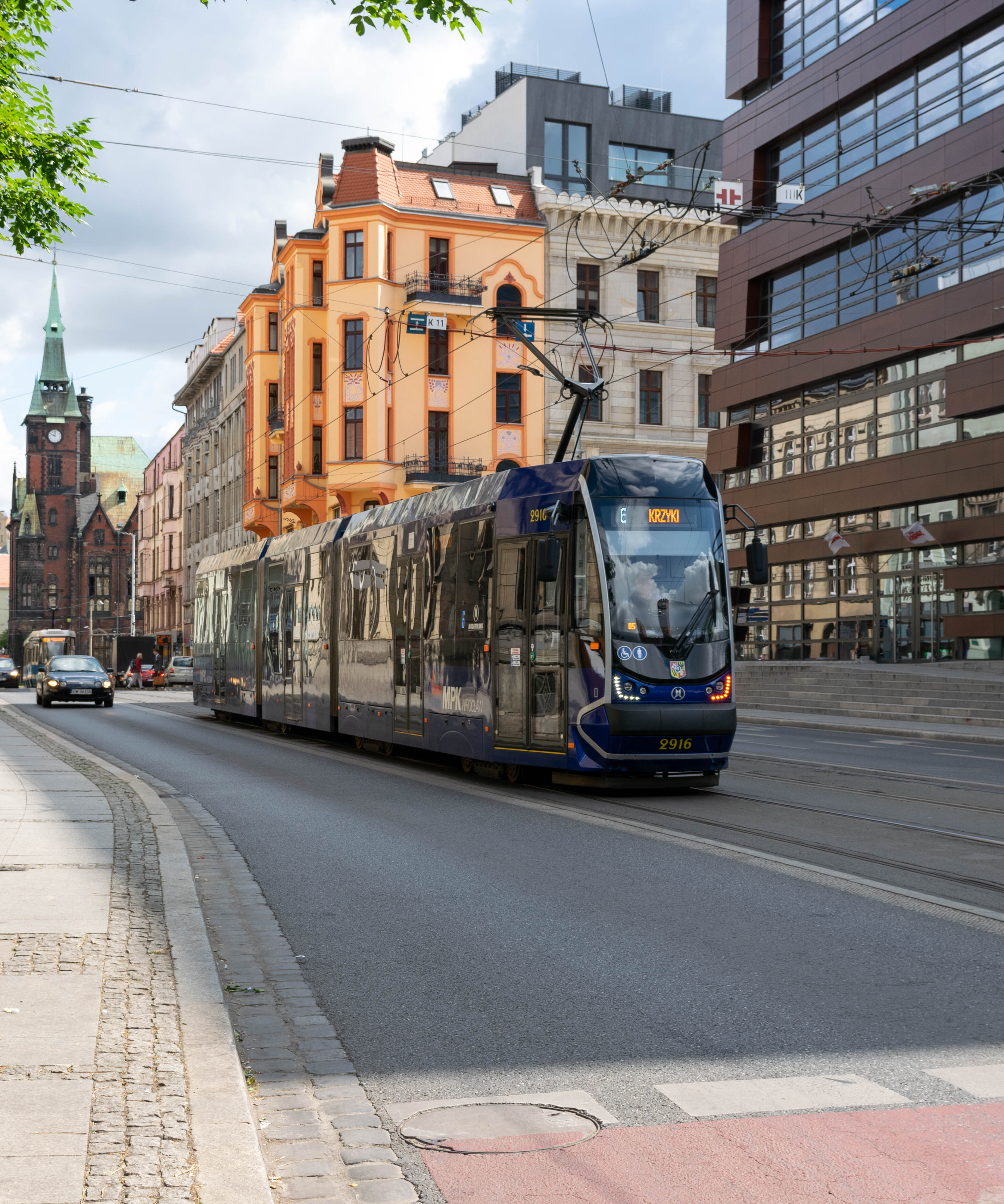 Tramway à Wroclaw, Moderus Beta MF 24 AC n°2916